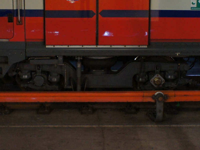 Wózek toczny elektrycznego zespołu trakcyjnego Alstom Metropolis 98B Metra Warszawskiego.